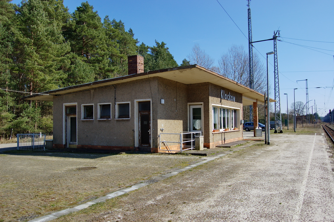 Bahnhofsgebäude von Klockow bei Waren, 2009. Um 1960 entstanden zwischen Berlin und Rostock viele Bahnhofsgebäude dieses Typs. Die meisten davon sind, wie auch das in Klockow, mittlerweile abgerissen.